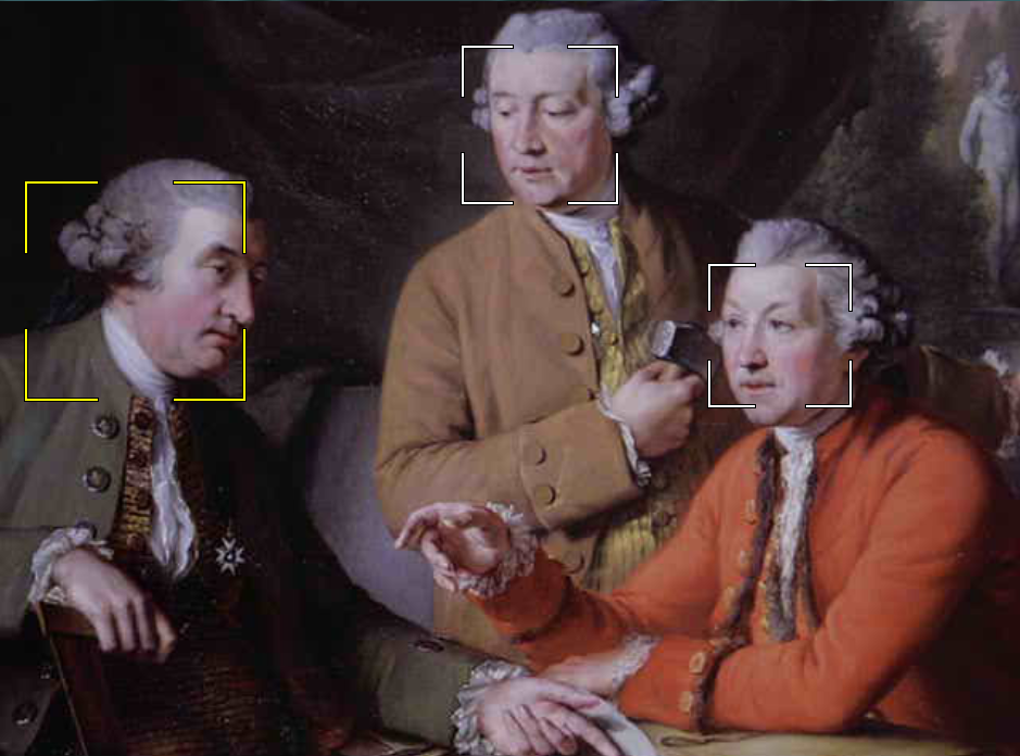 Photographische Live-View-Aufnahme des Gemäldes "Sir William Chambers; Joseph Wilton; Sir Joshua Reynolds" von John Francis Rigaud mit erweiterter Realität: Der durch die jeweils vier rechten Winkel angedeuteten Fokussierungsrahmen zeigen scharf eingestellte Gesichter an.